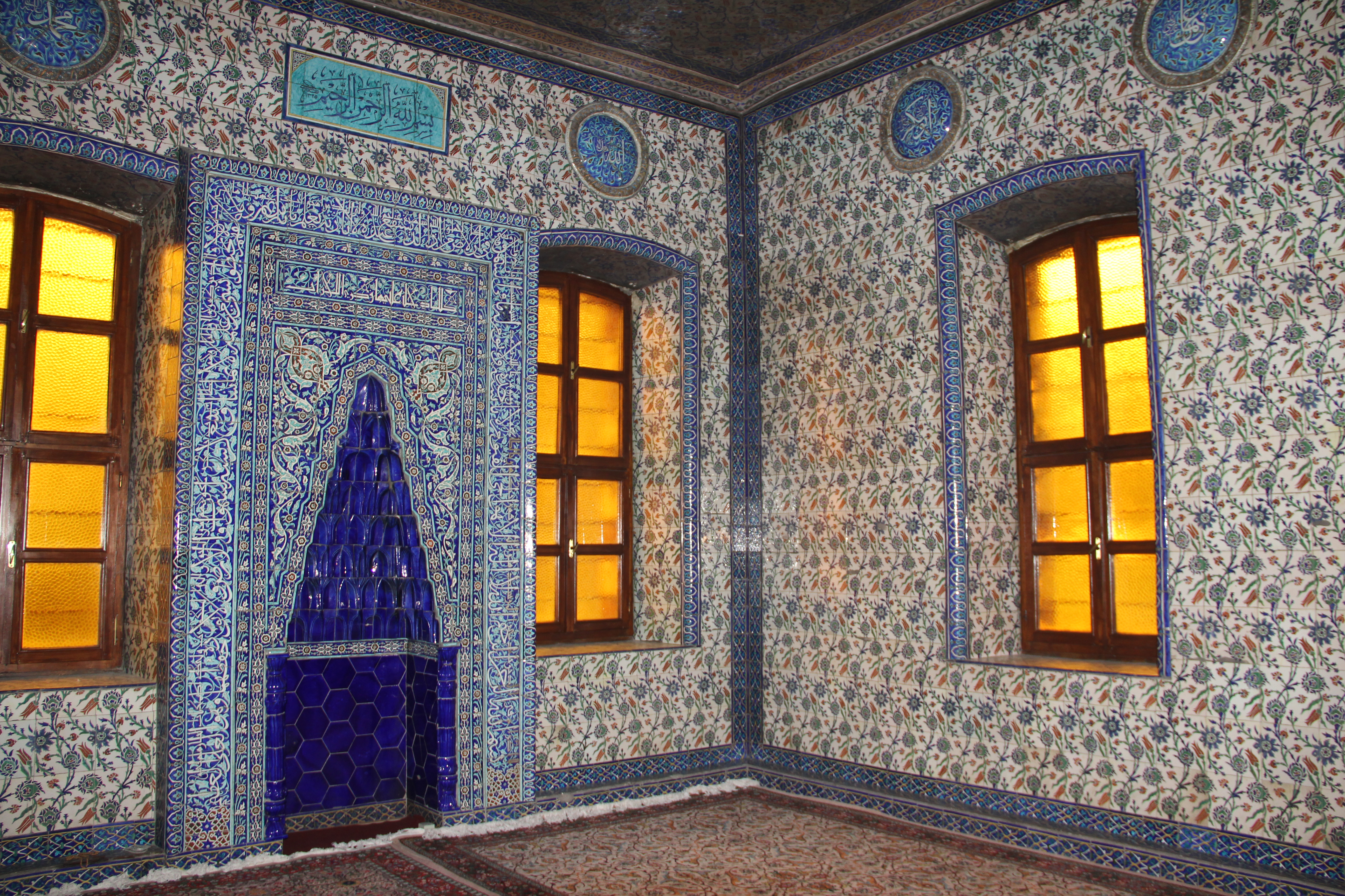 kütahya hükümet konağı mescidi